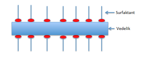 Marangoni efekt kilel